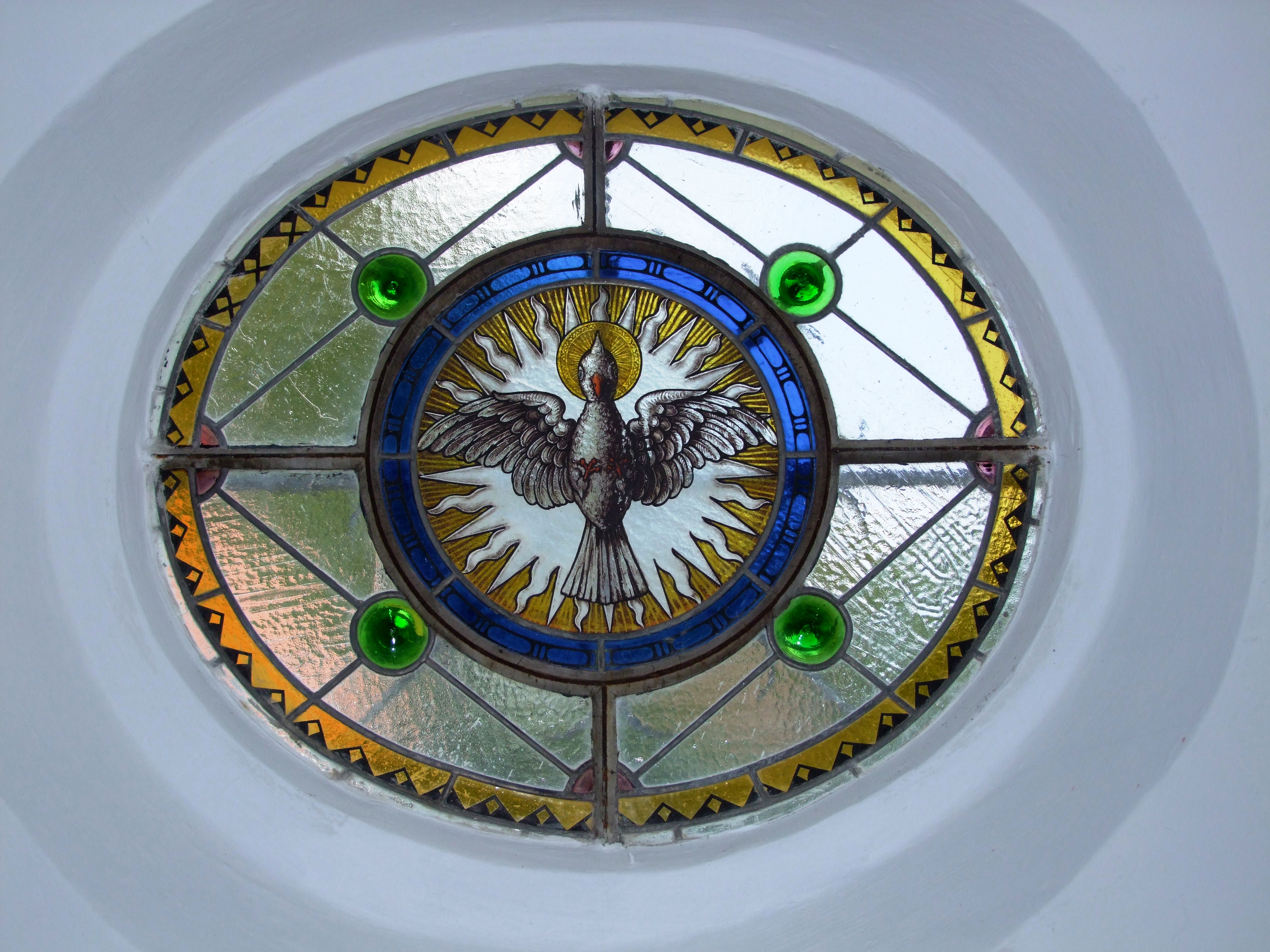 St. Peter und Paul in Bellenberg